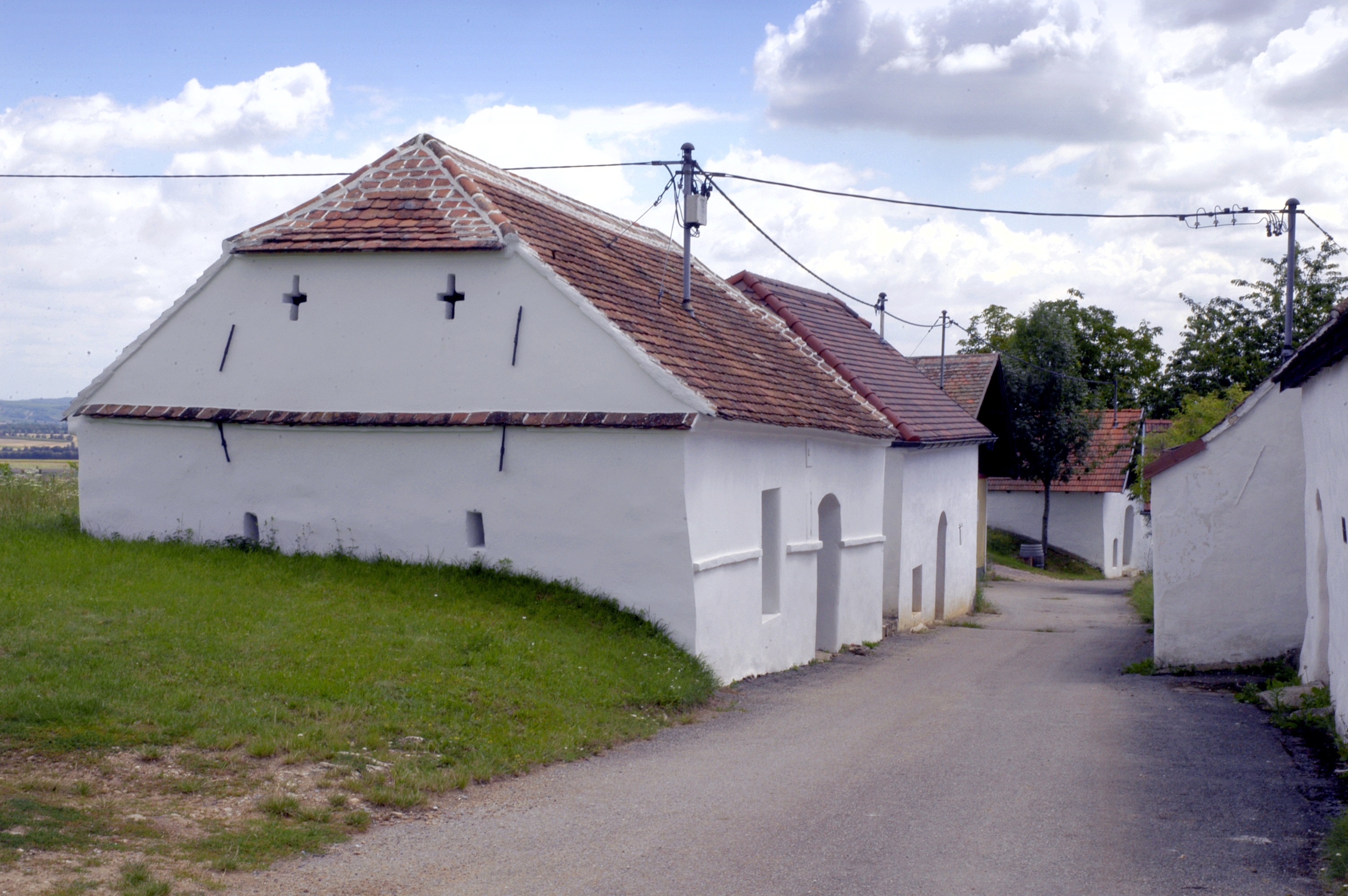 Öhlbergkellergasse in Pillersdorf, Gemeinde Zellerndorf, Niederösterreich